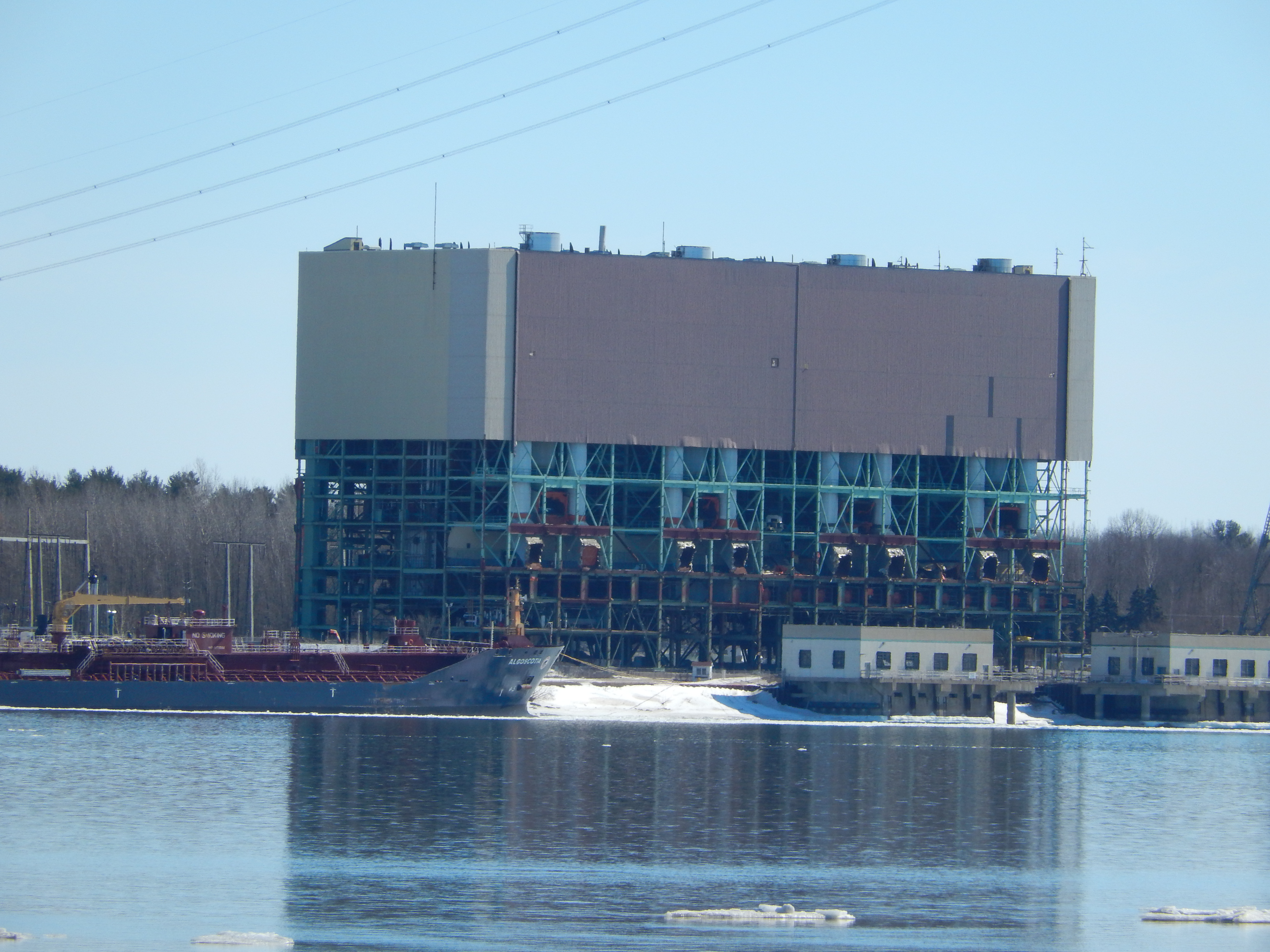 Centrale de Tracy en mars 2015